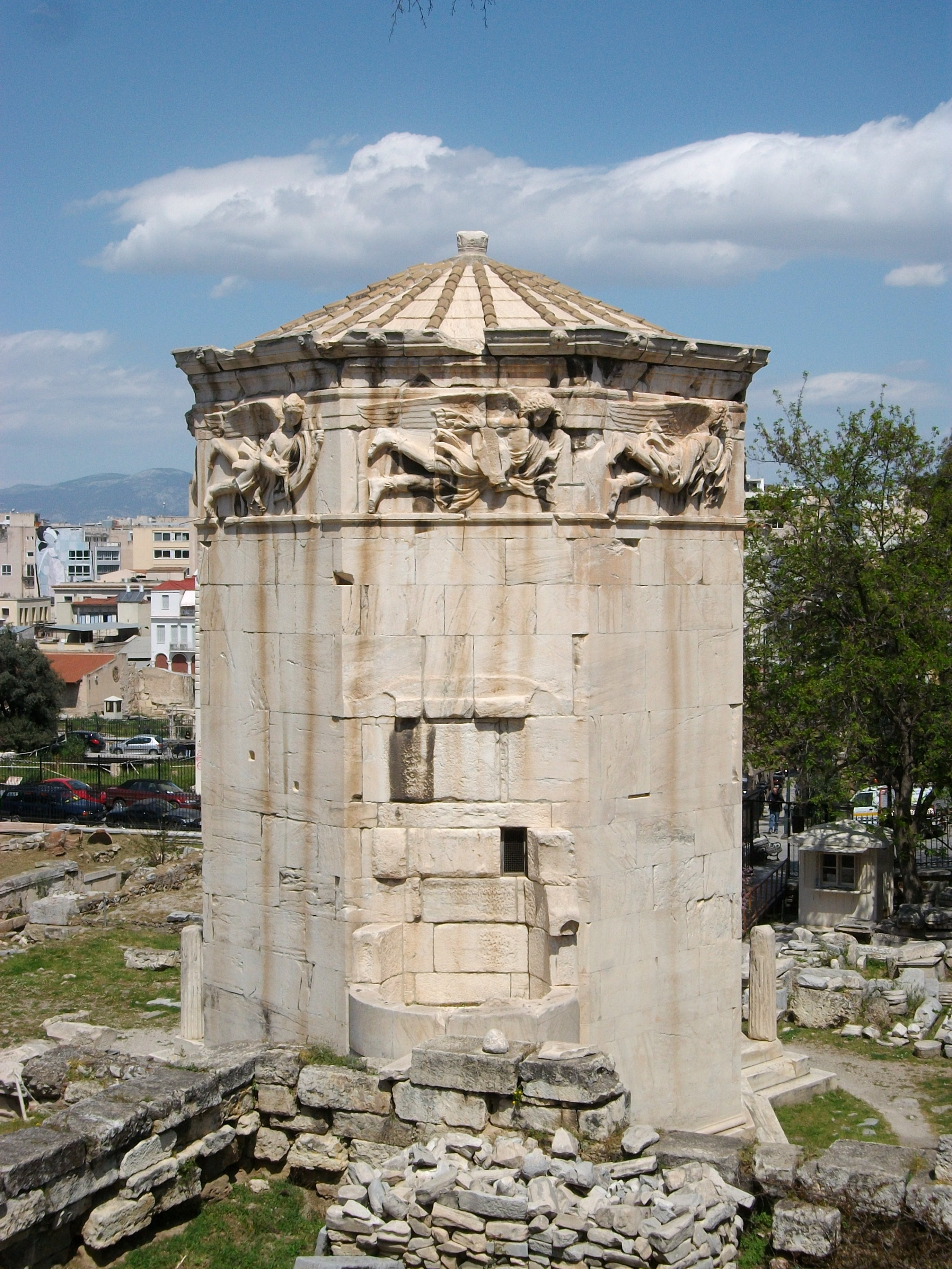 Torre dels Vents d'Atenes.